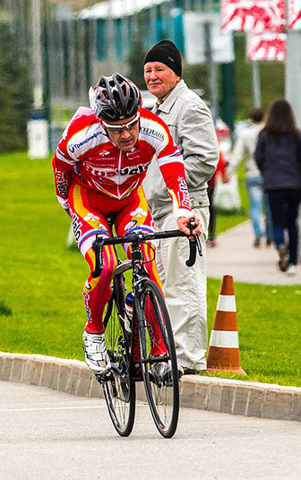 Александр Беспалов, велогонщик, Набережные Челны